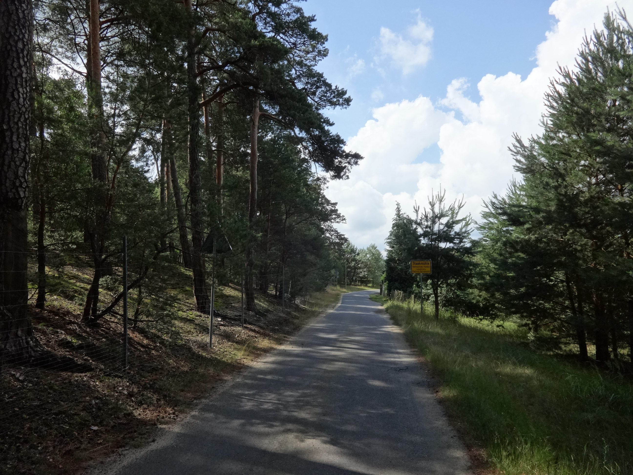 Staakmühle, ein Gemeindeteil von Halbe, Landkreis Dahme-Spreewald, Brandenburg